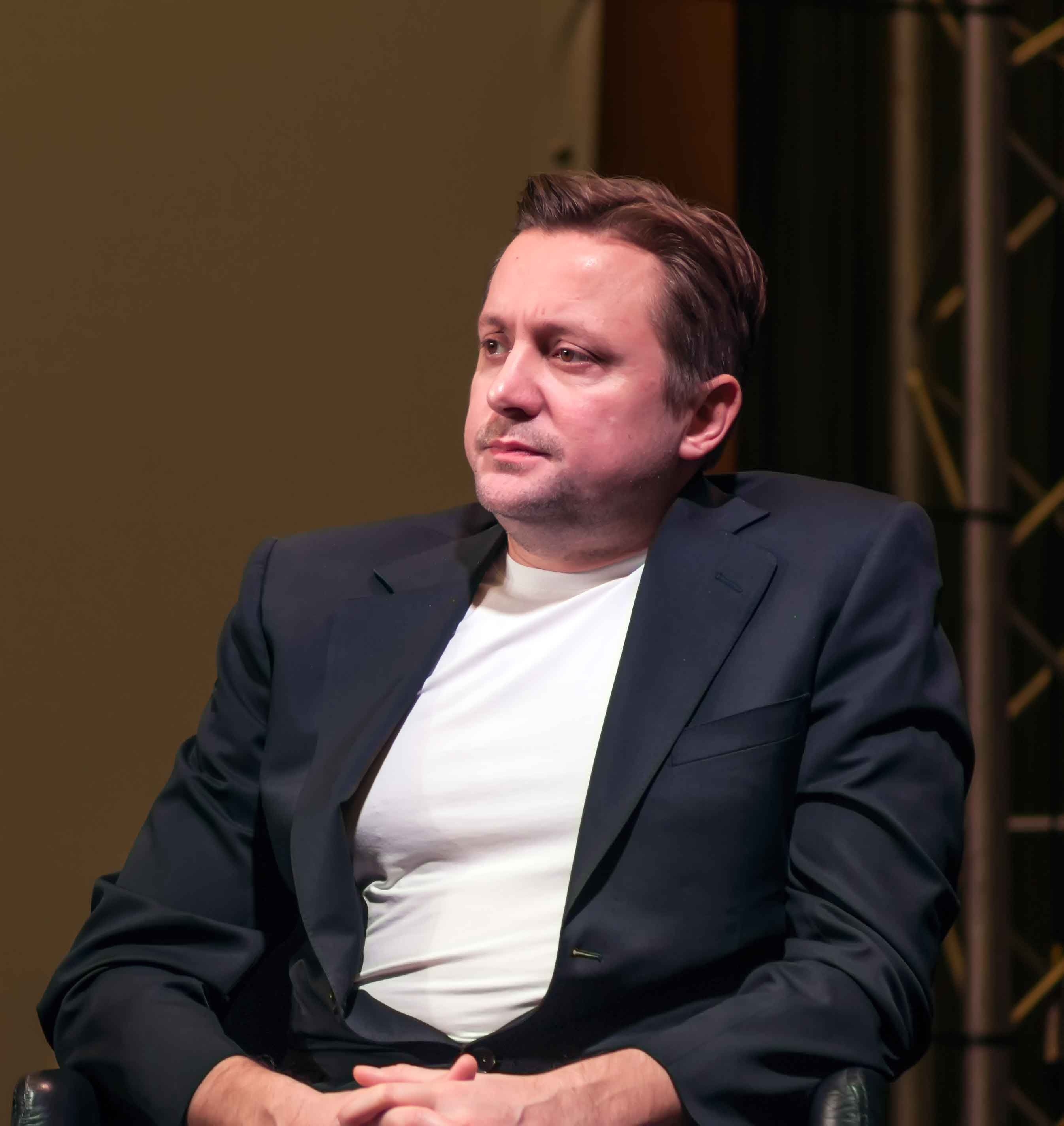 кинофестиваль SIFFA